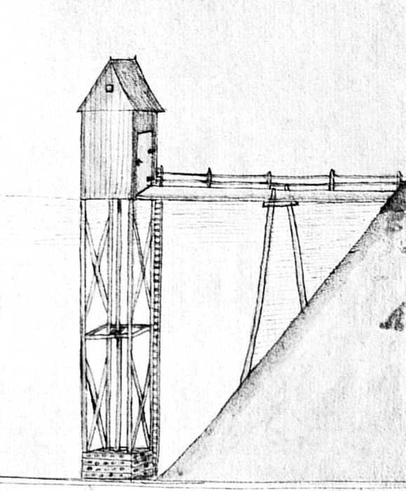 Striegelhaus ältere Bauart bis 1730